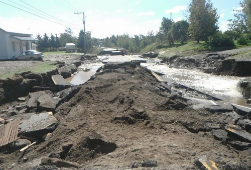 Dégats causés par l'ouragan Irène dans la Beauce (Québec) lors de son passagele 28 août 2011.